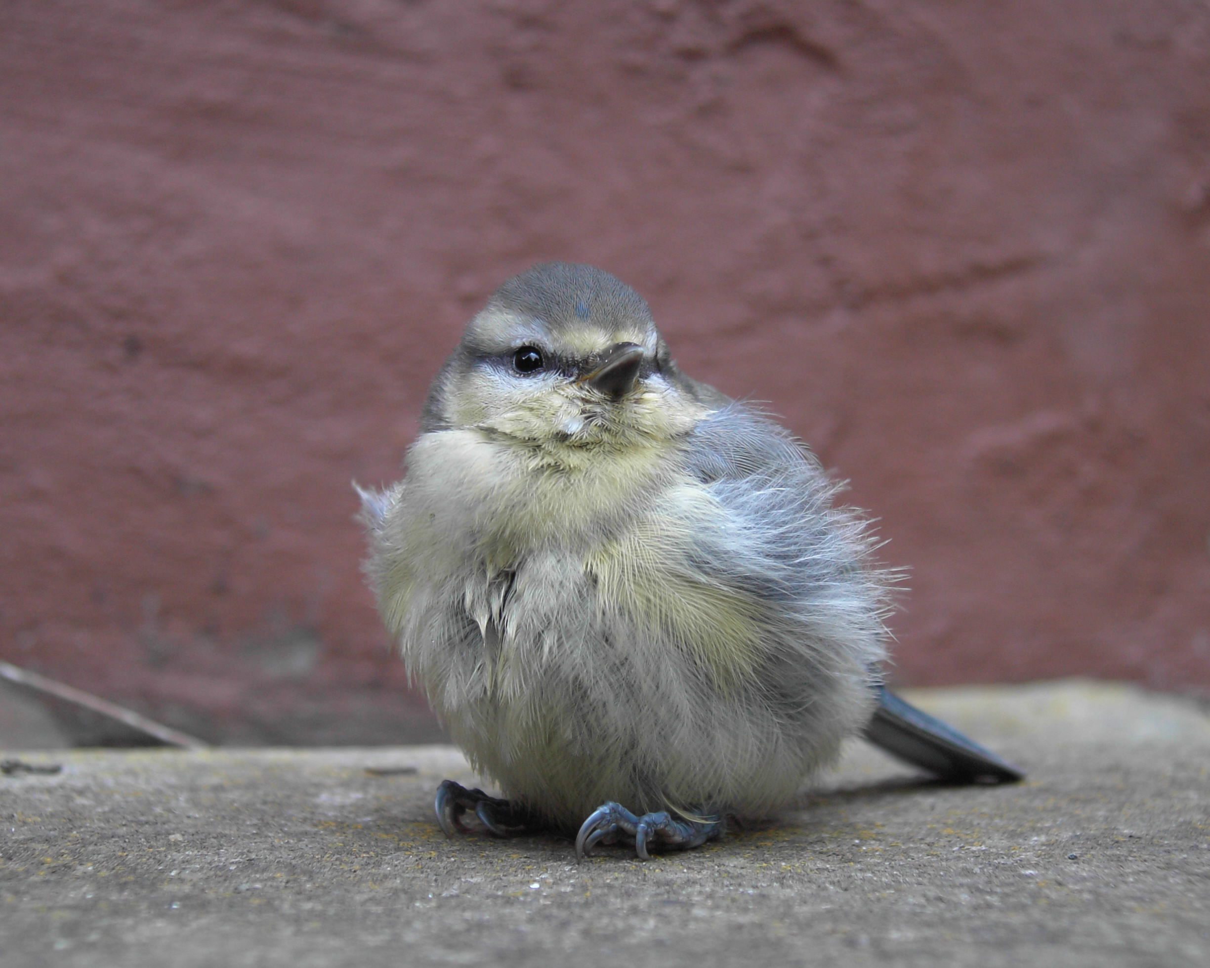 Young Parus caeruleus